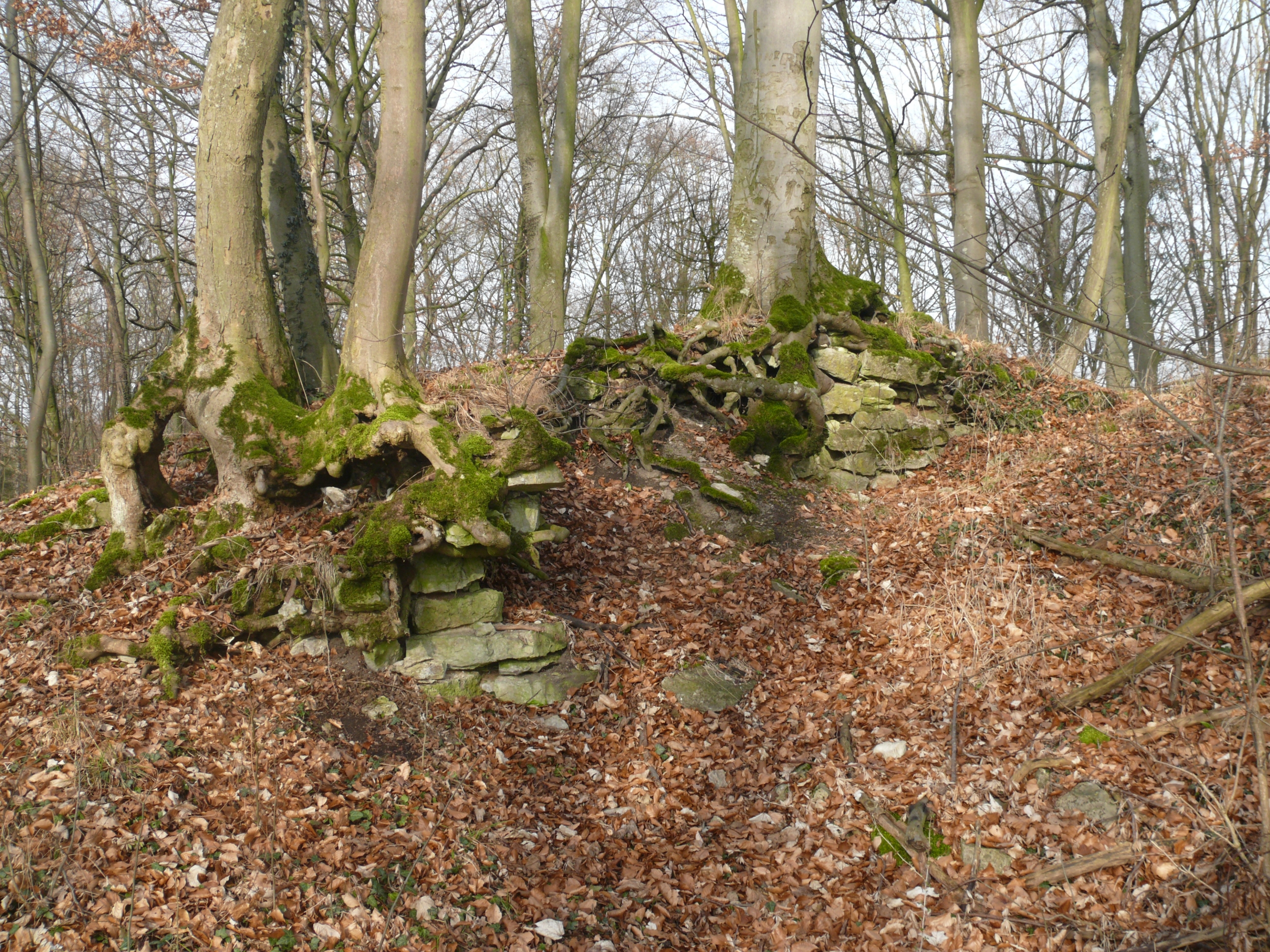 abgegangene Burg Bielriet, Mauerreste